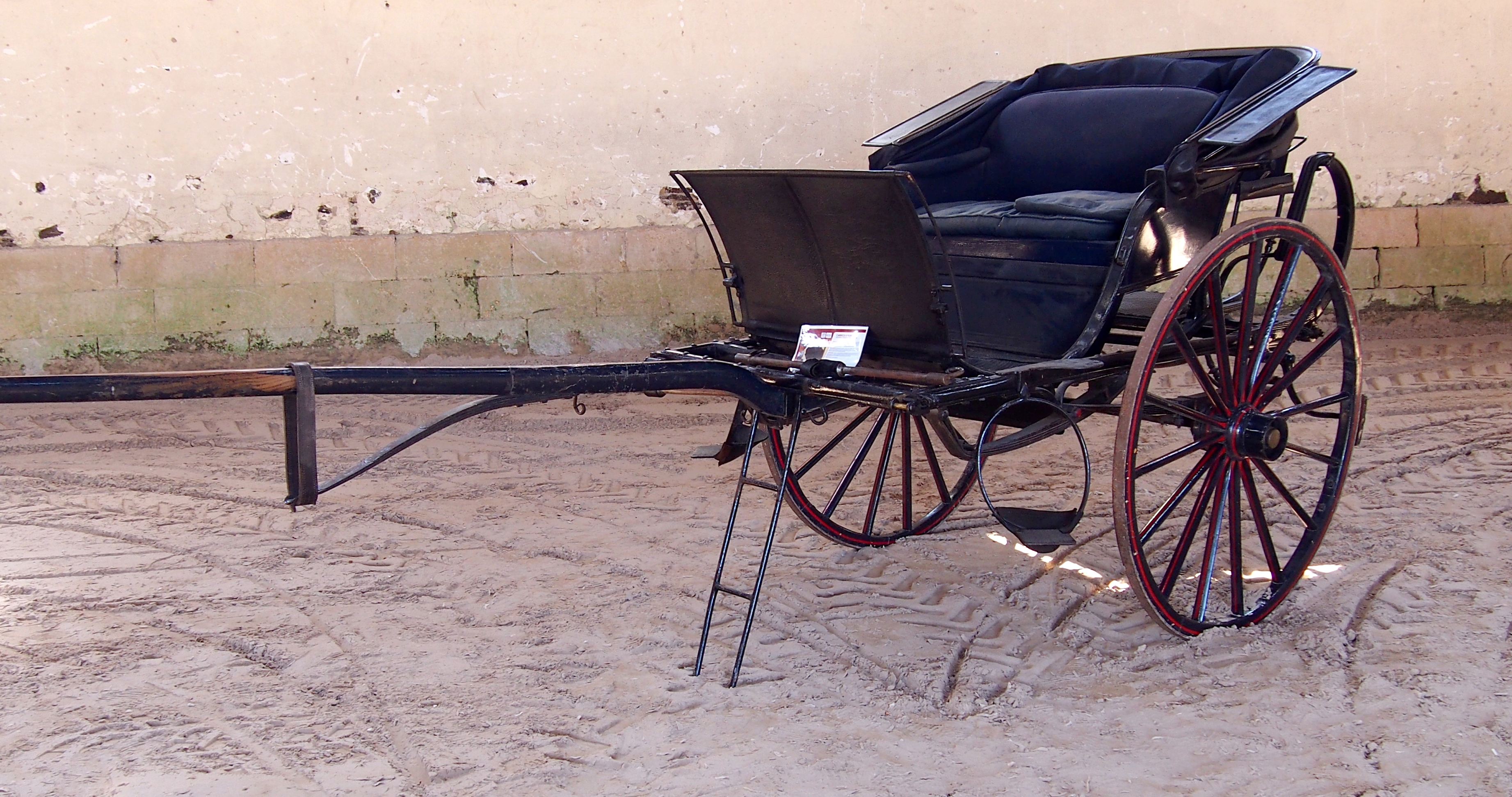 Carrick à pompe Peter & Sons (haras national de Saint-Lô, Normandie, France).